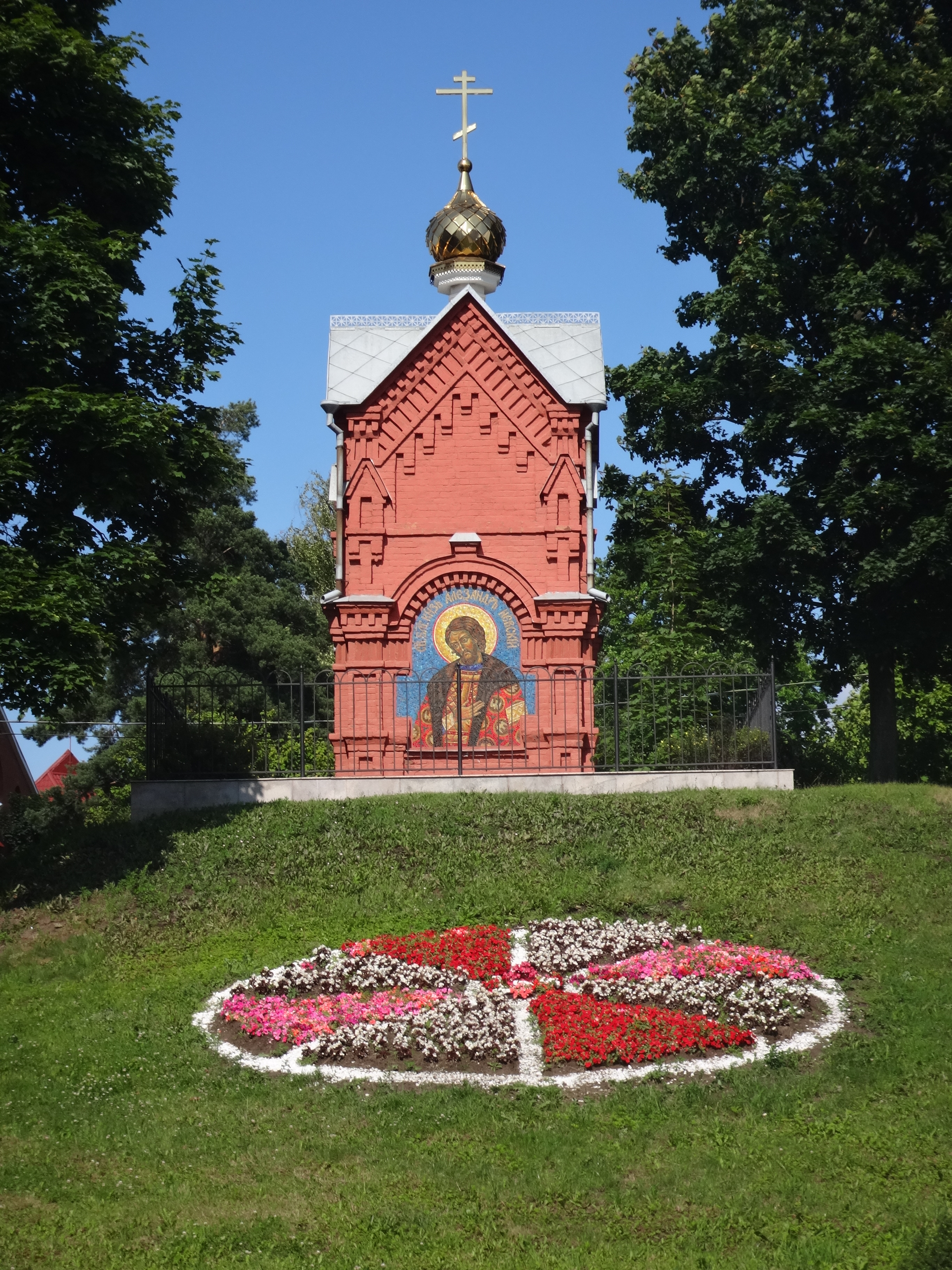 Часовня Александра Невского у Земледельческого переулка